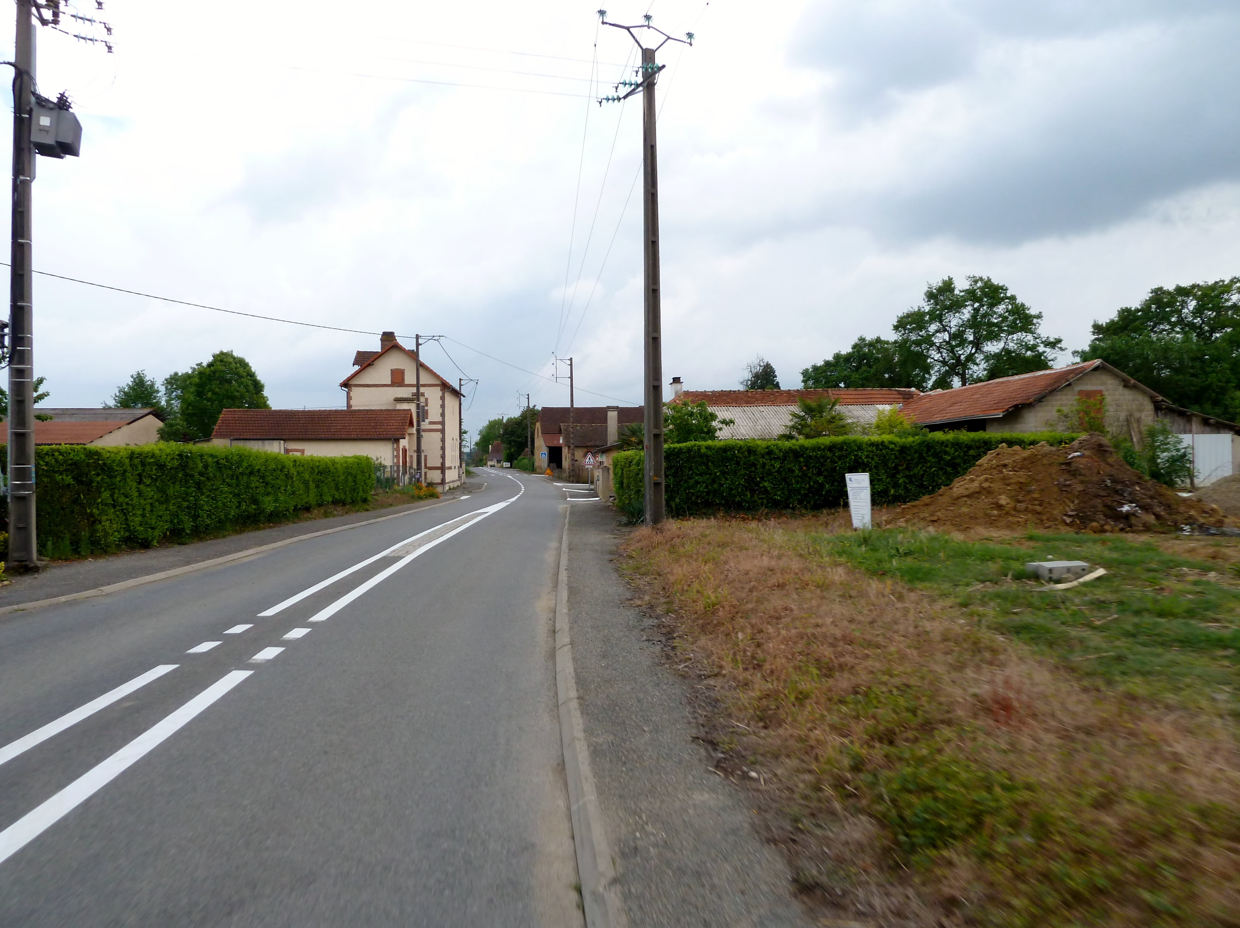 Castillon (Canton de Lembeye)